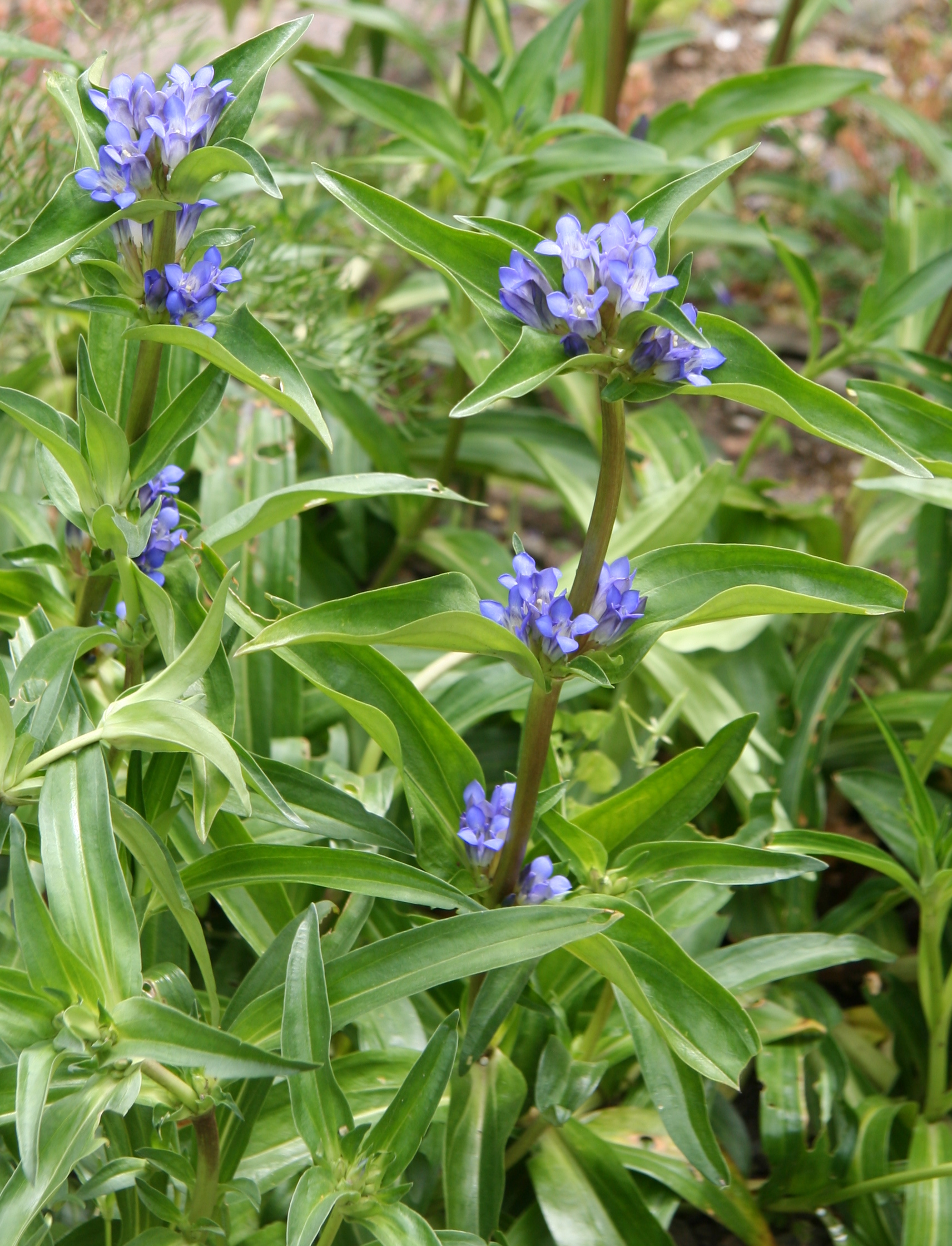 Gentiana decumbens im Botanischen Garten Dresden